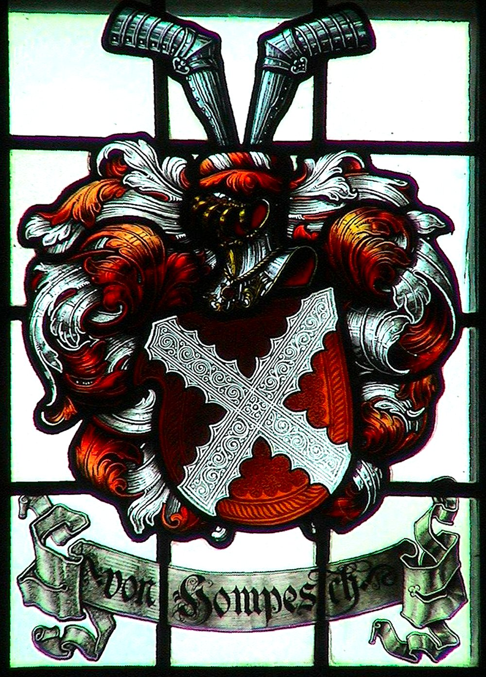 Wappen Familie v. Hompesch